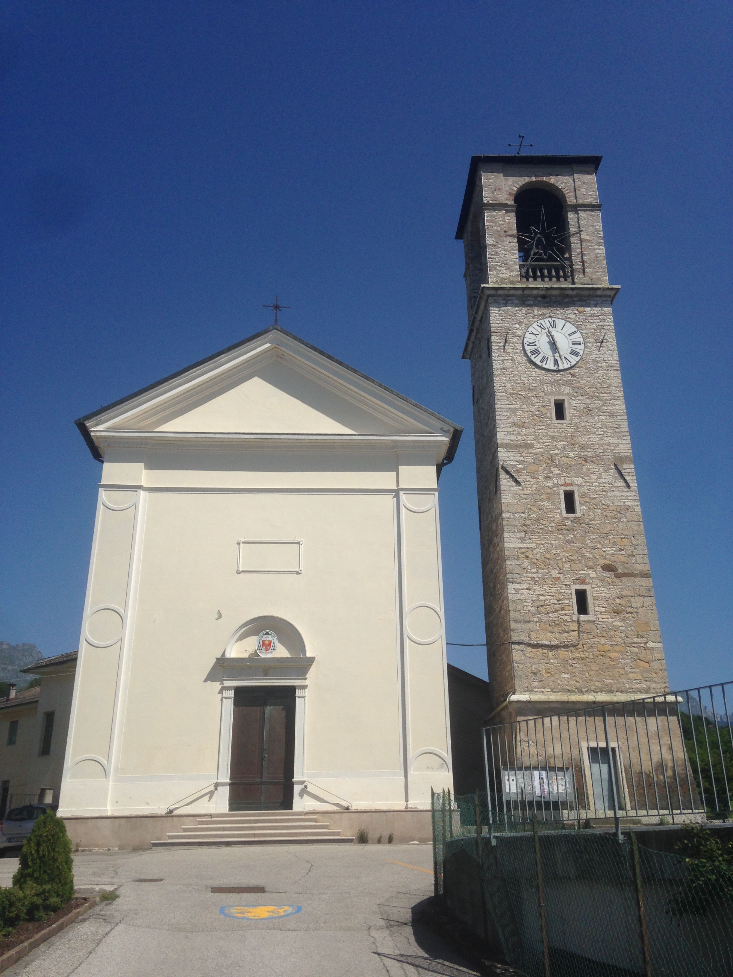 Facciata e campanile della Chiesa di Sant'Agata nella frazione di Vellai.